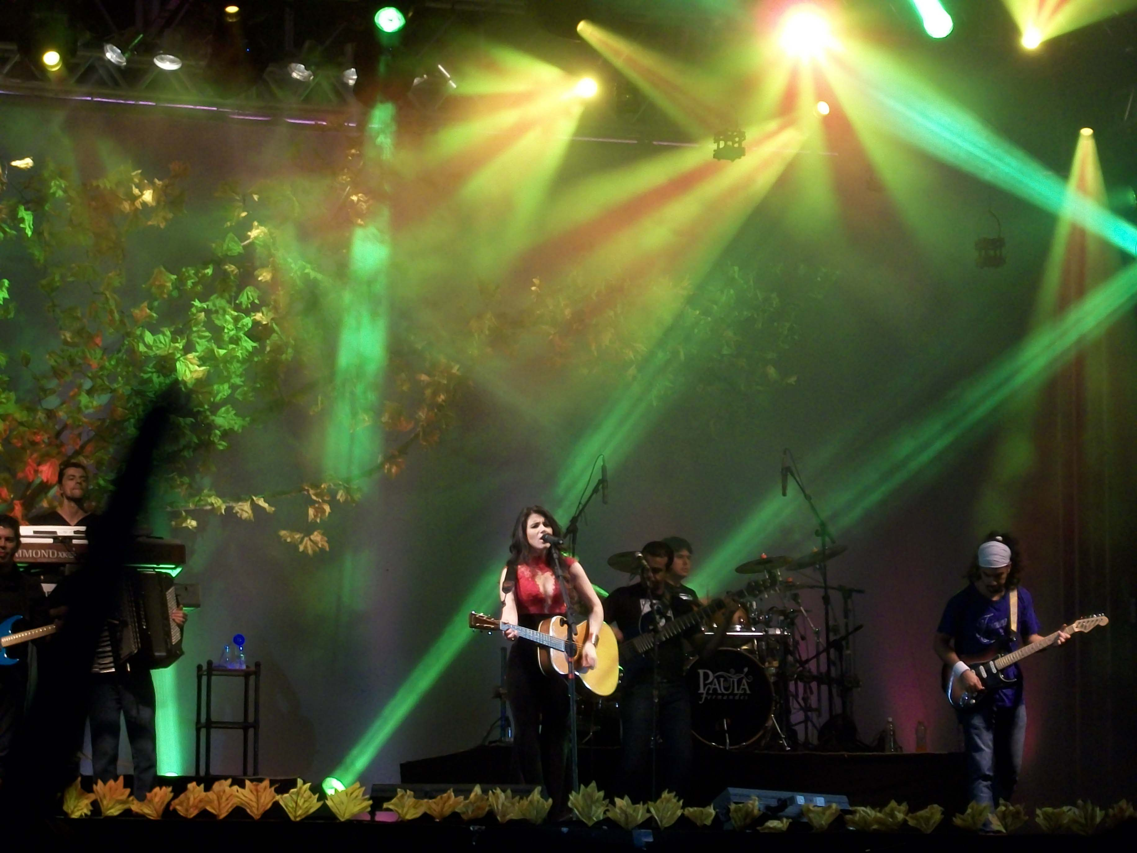 Show da cantora brasileira Paula Fernandes em Birigui em 14 de agosto de 2011.